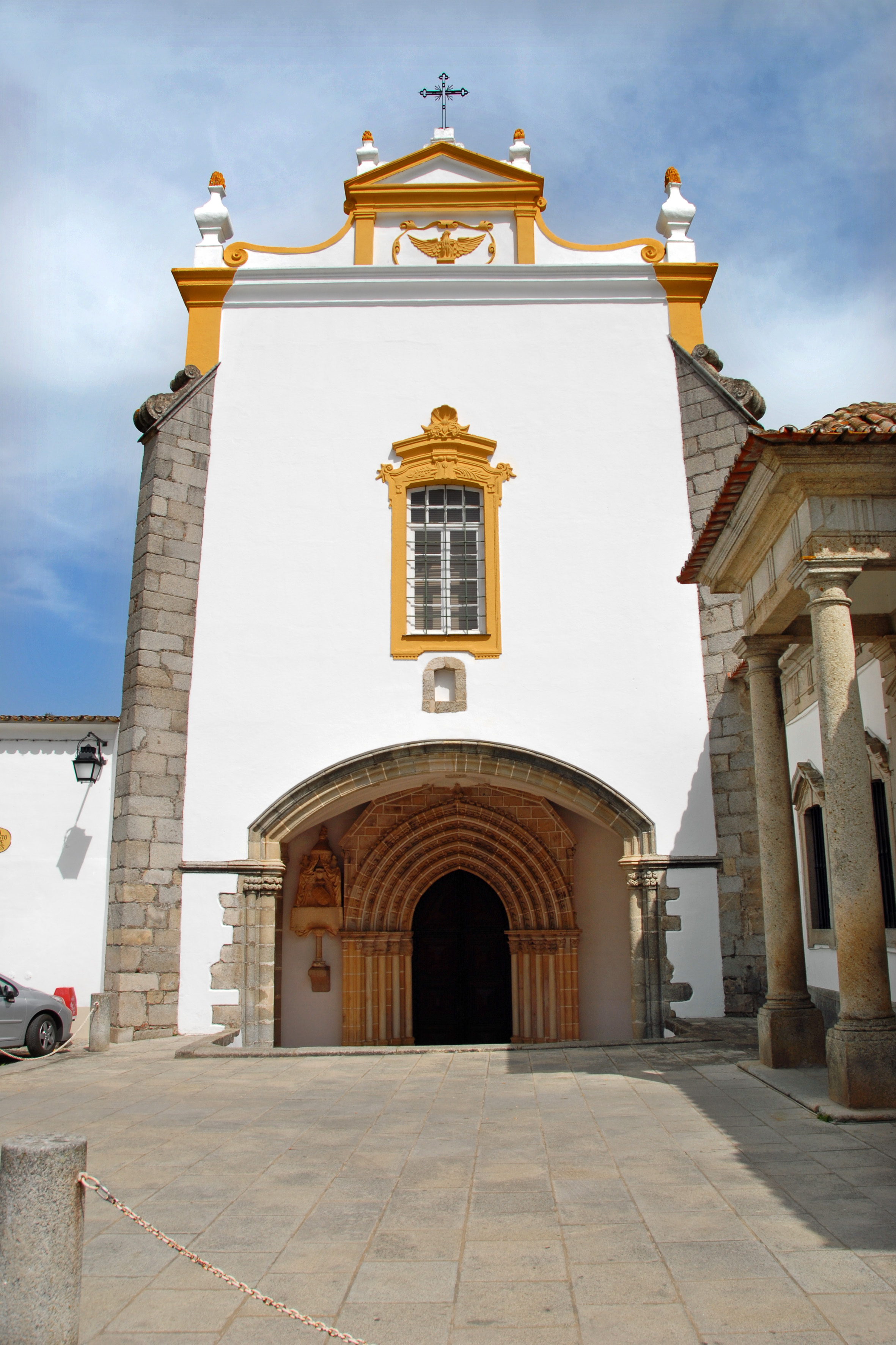 Convento dos Lóios ou Convento de São João Evangelista This file was uploaded for Wiki Loves Monuments in Portugal with the unique identifier 69781.